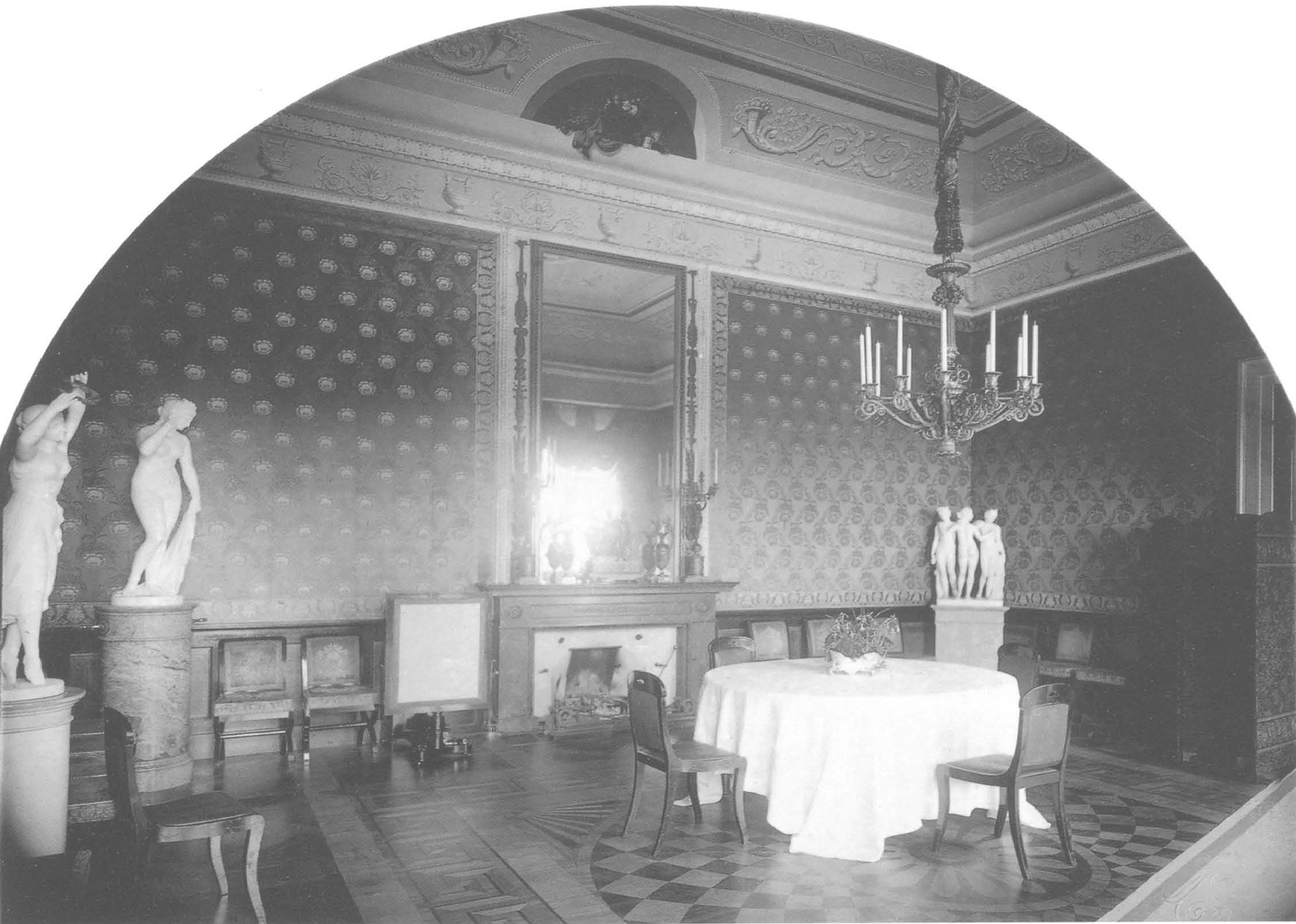 Rotes Zimmer, Stuttgart, Schloss Rosenstein. Foto von Herzog Philipp von Württemberg, 1898.